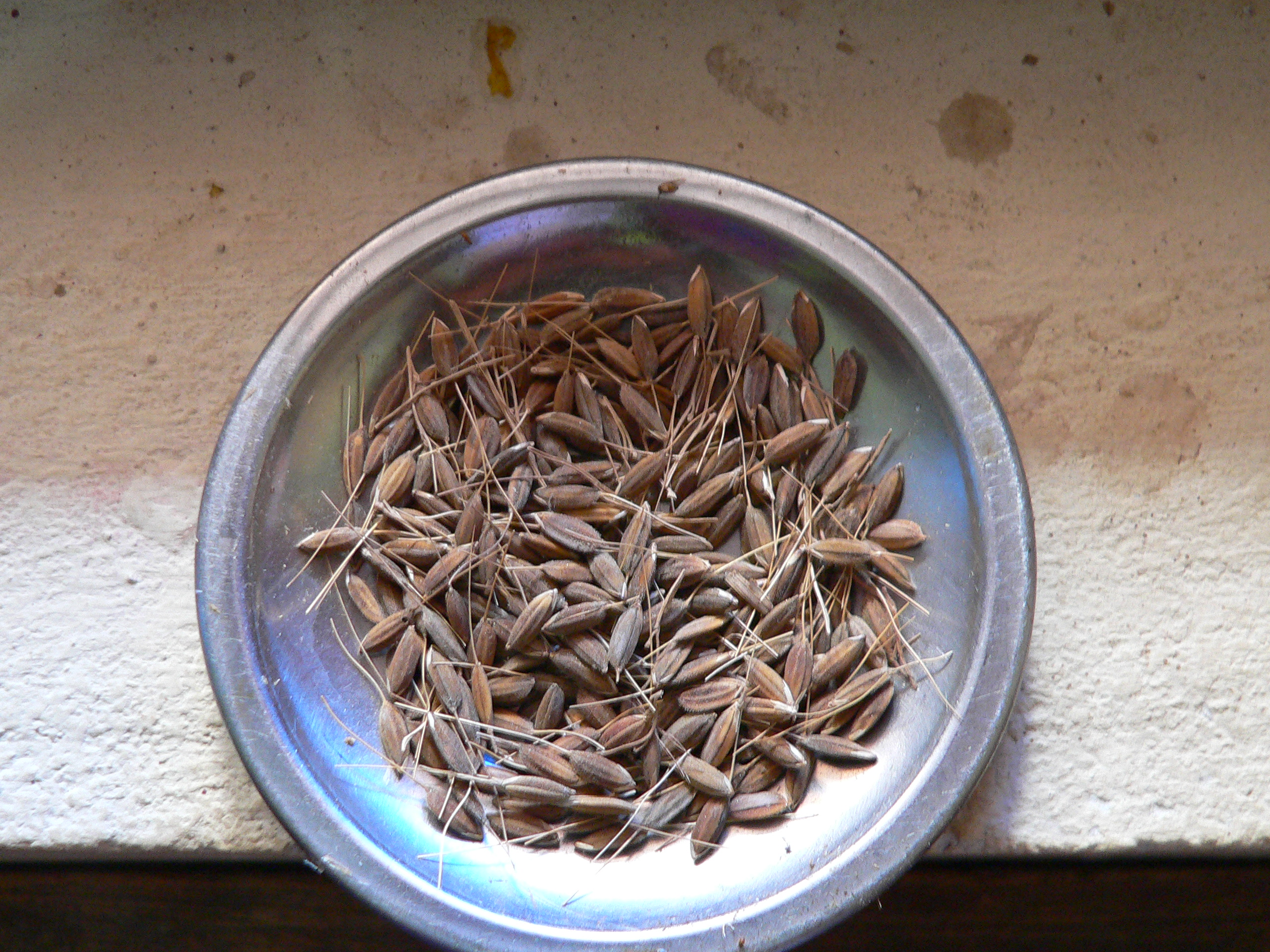 ഓക്കപുഞ്ച